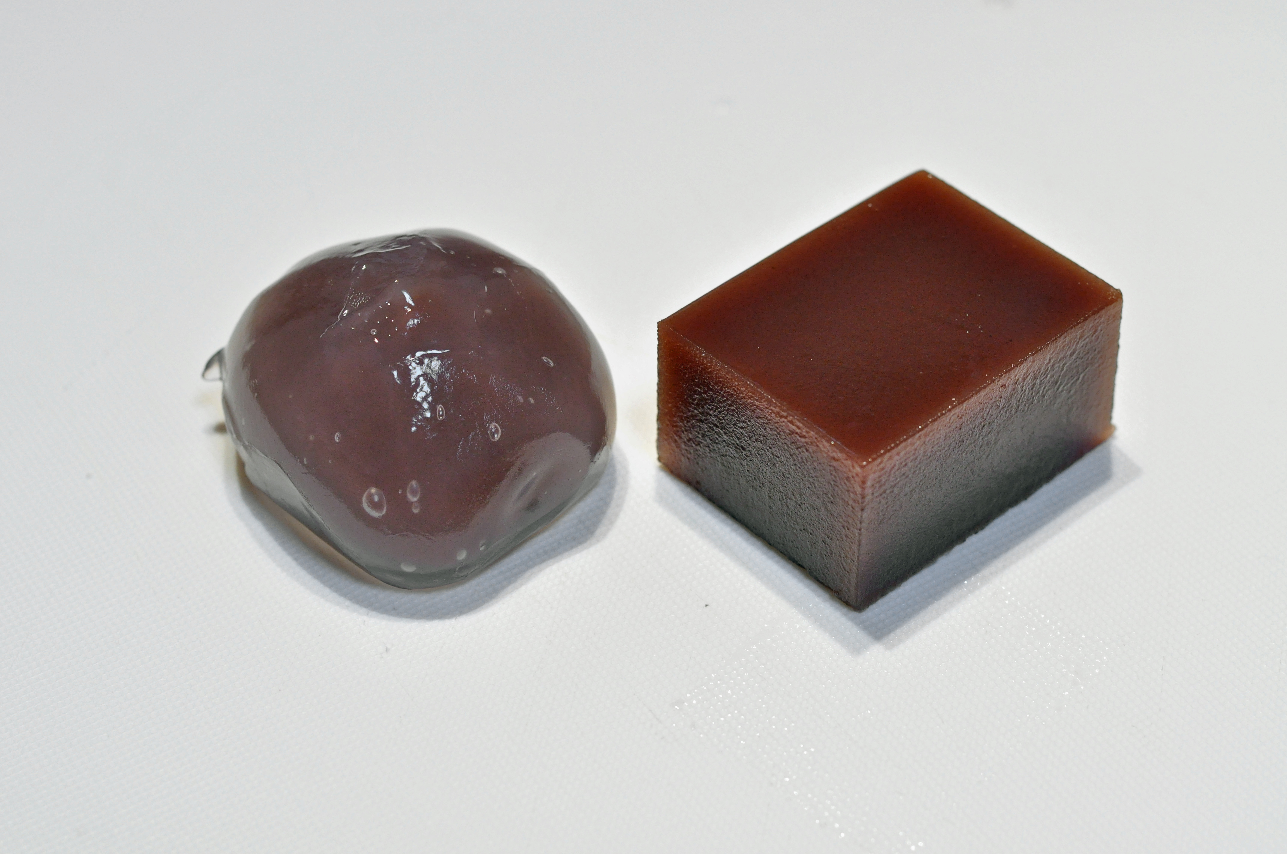 羊羹と葛饅頭